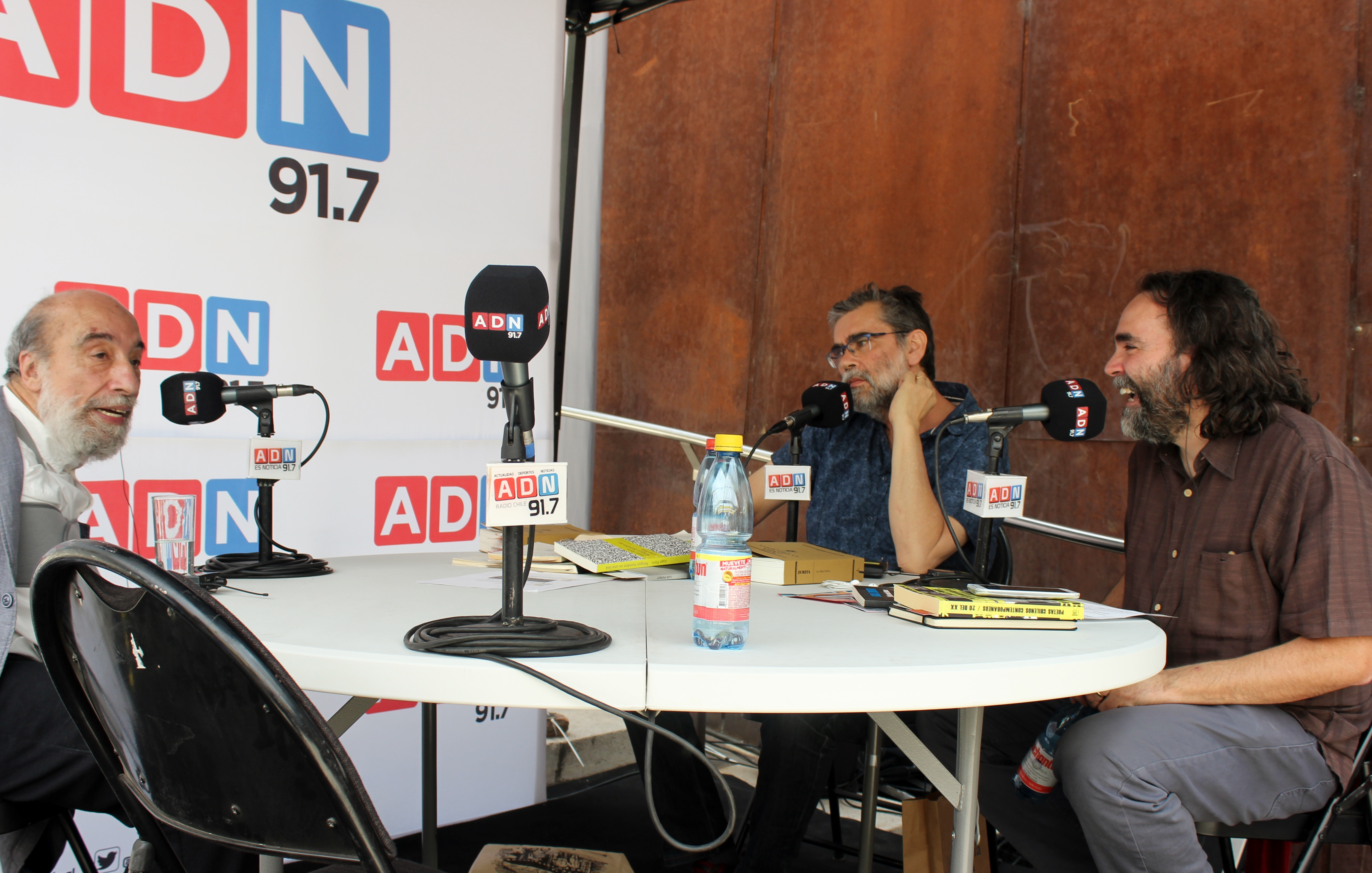 El poeta chileno Raúl Zurita durante una entrevista para la Radio ADN realizada por Francisco Mouat y Carlos Costas (riendo) en la segunda etapa del Festival de Autores de Santiago 2018; plaza Zócalo, GAM.